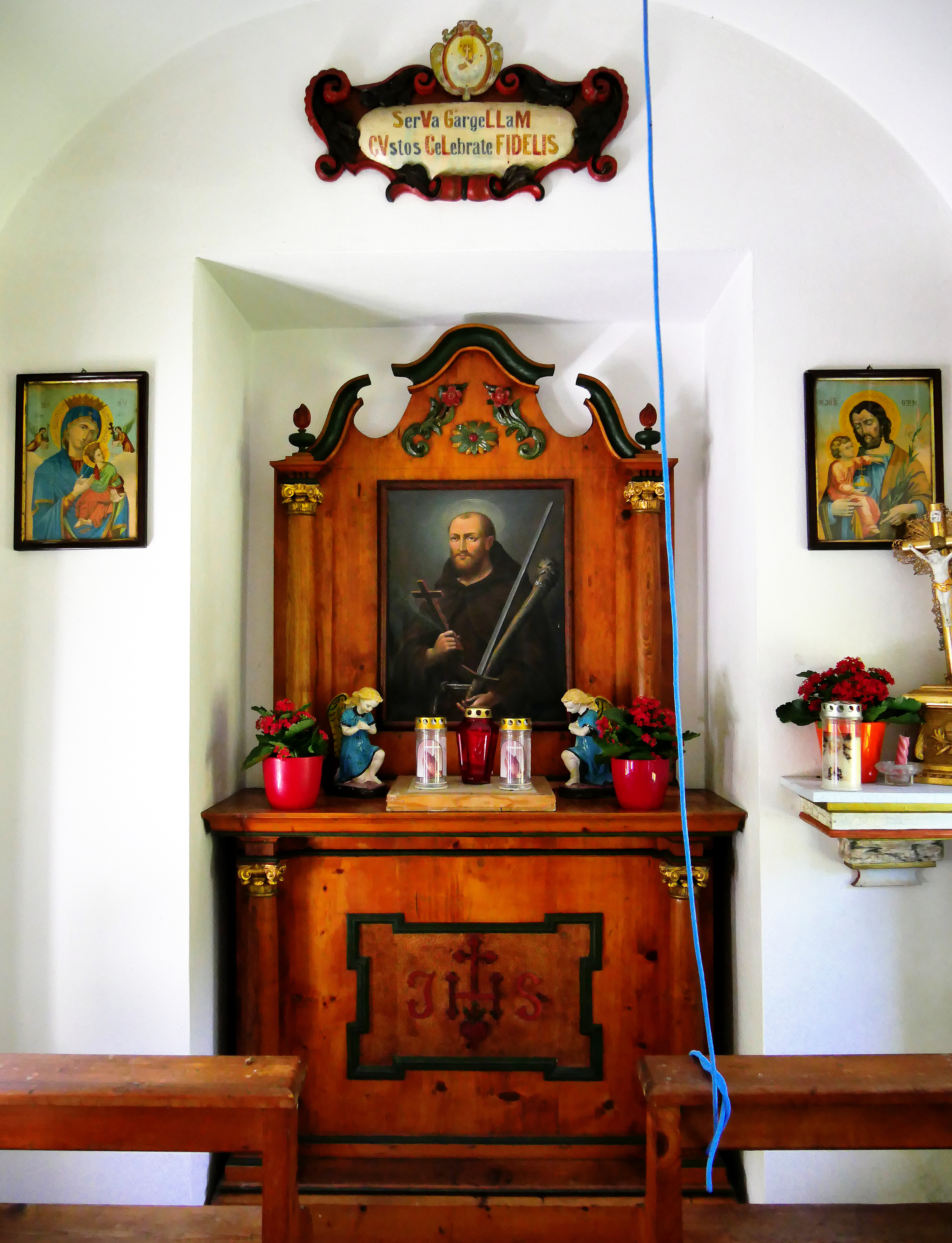 Fideliskapelle (Gargellen) an der Talstraße von St.Gallenkirch nach Gargellen